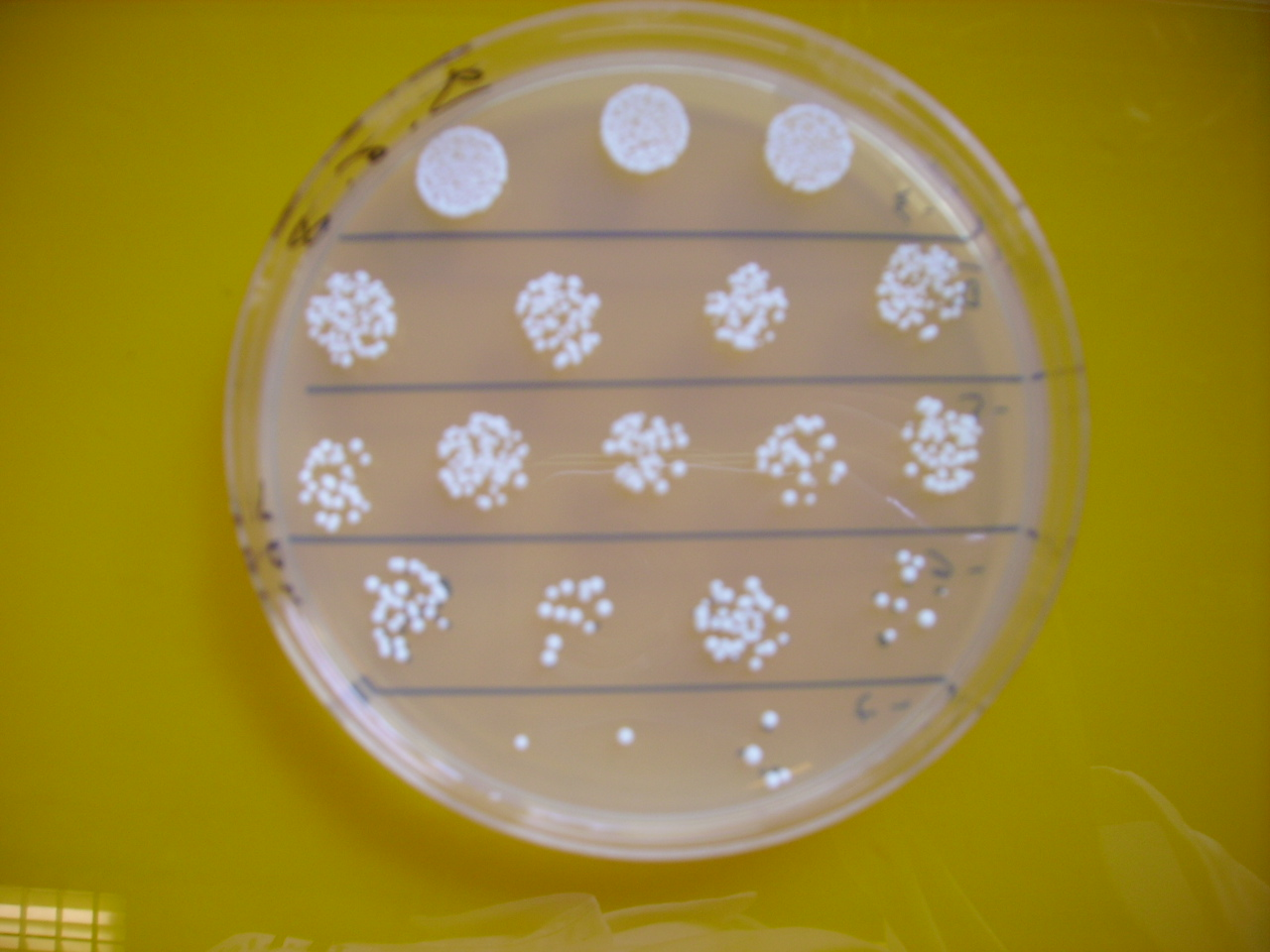 Aspect de colonnies de Brettanomyces bruxellensis sur gélose YPD (Yeast Peptone D-glucose) lors d'un dénombrement par la technique des gouttes.